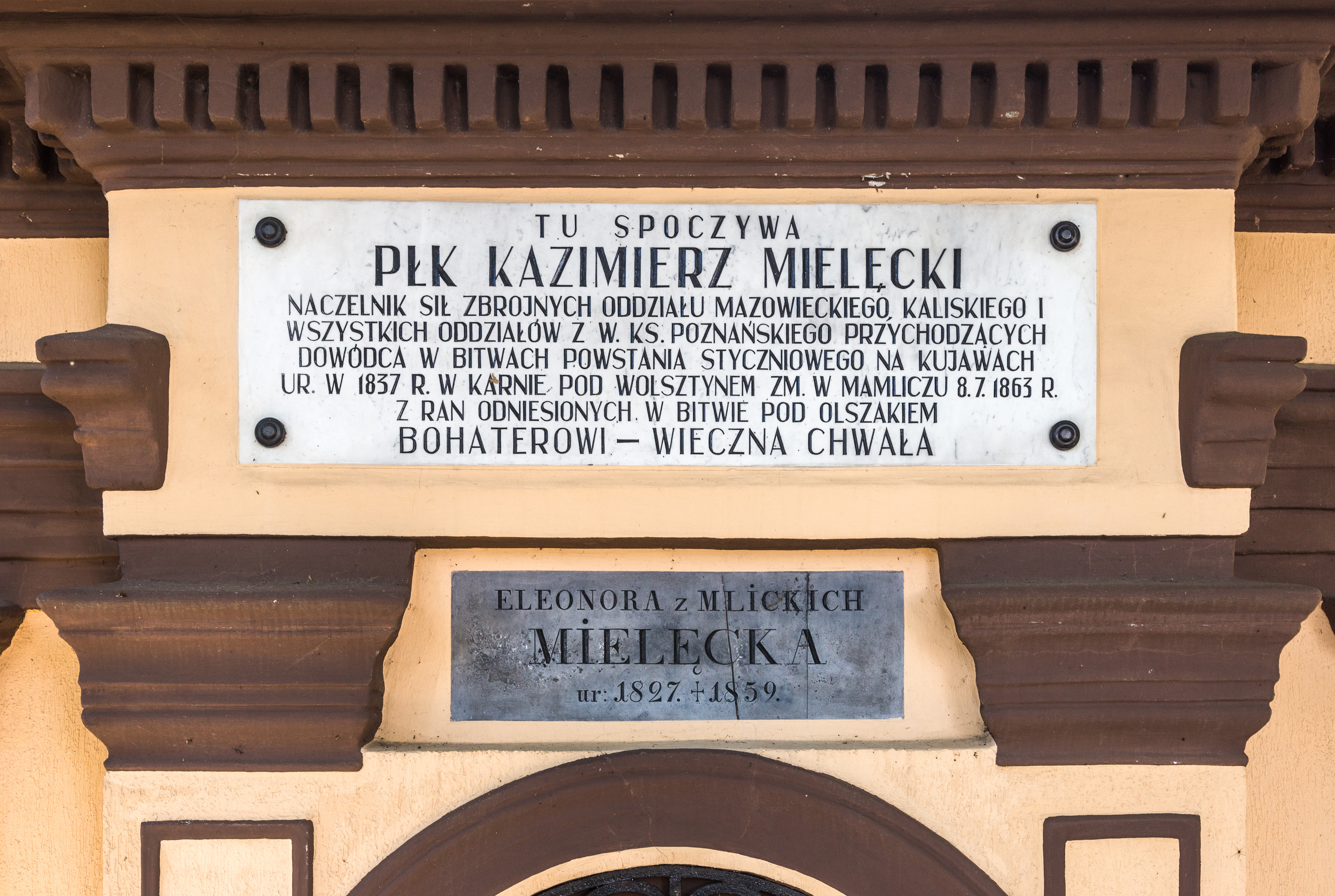 Cmentarz parafialny w Łabiszynie - inskrypcja na grobowcu Mielęckich dotycząca Kazimierza Mielelęckiego.